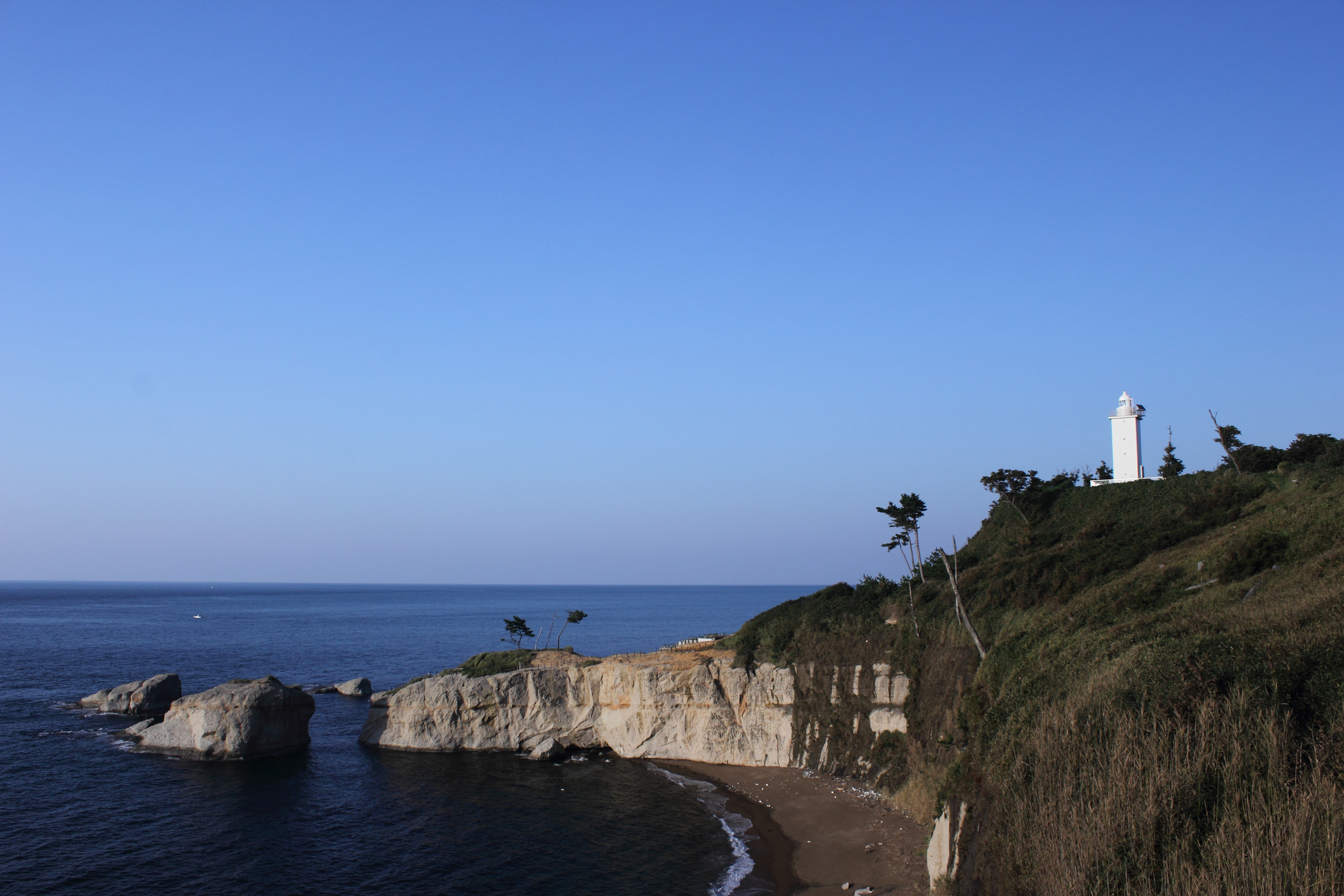 加佐の岬と加佐岬灯台